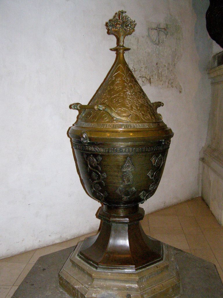 Bronzová krstiteľnica z roku 1409 je pozostatkom pôvodného gotického zariadenia katedrály. Podľa dedikačného nápisu pod horným okrajom kalichovitej kupy ju dal zhotoviť bratislavský richtár Ulrich Rauchenwarter: anno domini MXXXXIX tertia feria ante diem viti martiris. sanctus martinus. ulreich rauchenbarter pei des zeiten i.n.r.i. Meno kovolejárskeho majstra nie je známe. Kryt tvorí neogotická helmica z roku 1878